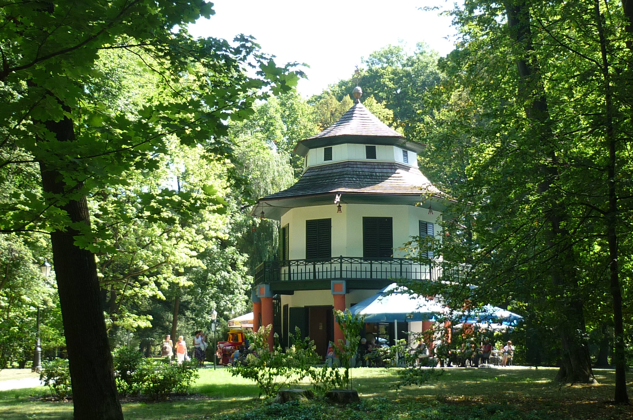 Chinesisches Haus im Park in Żywiec (Saybusch)